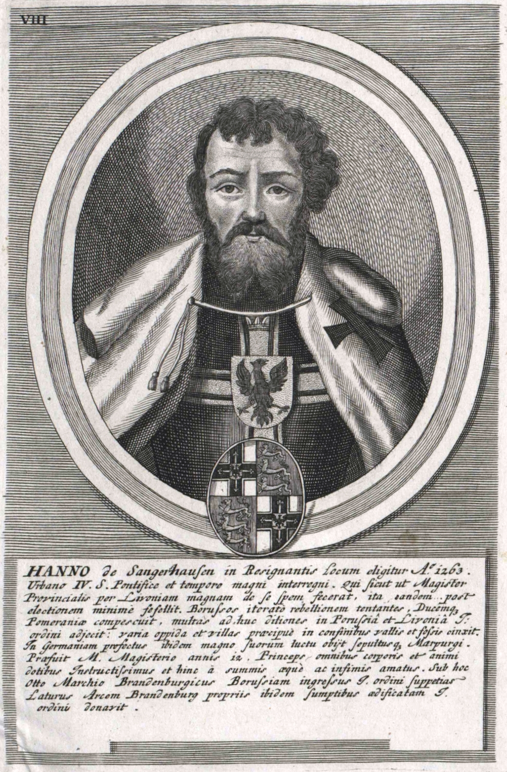 Anno von Sangerhausen (1210–1273)